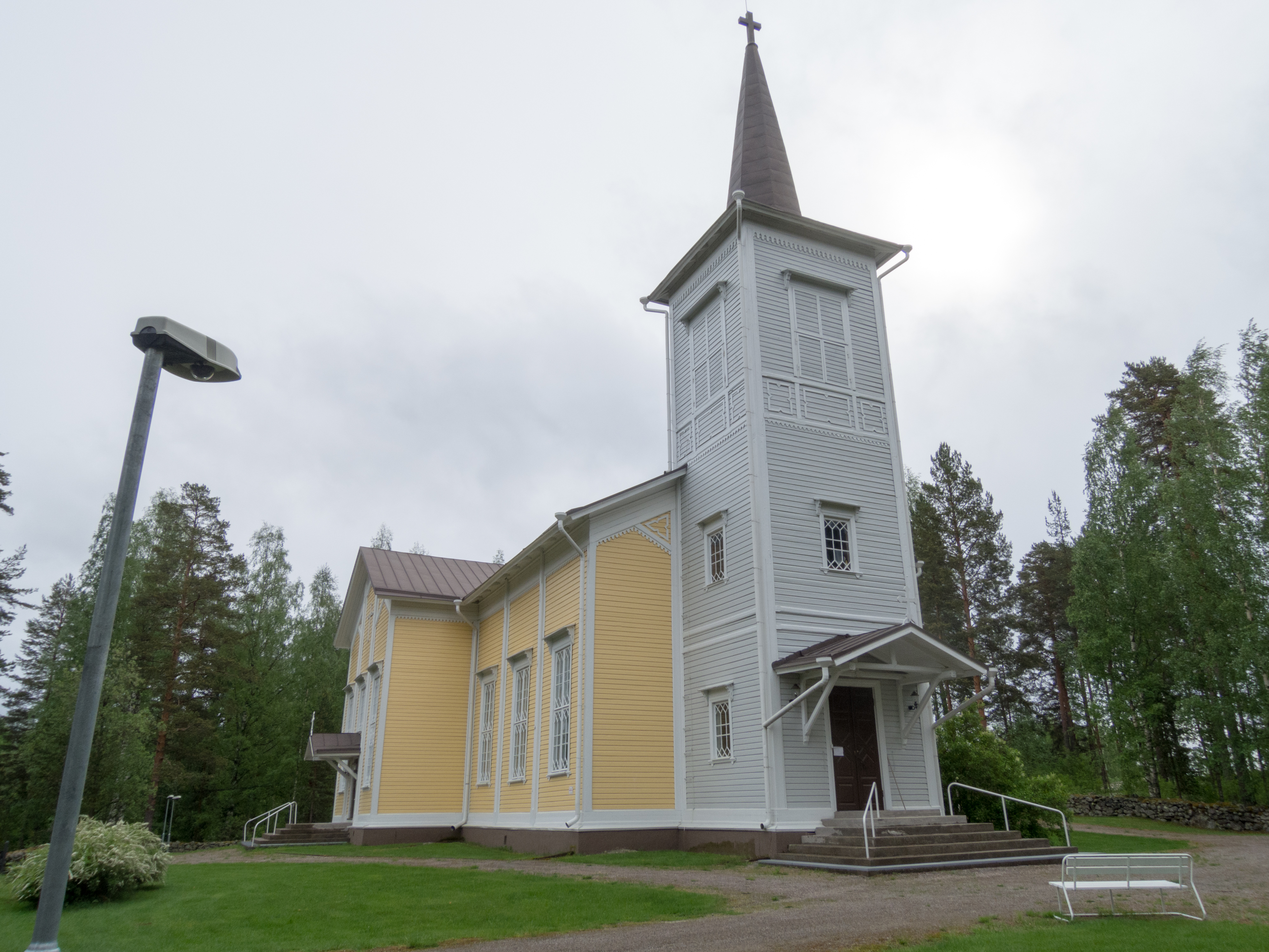 Savonrannan kirkko